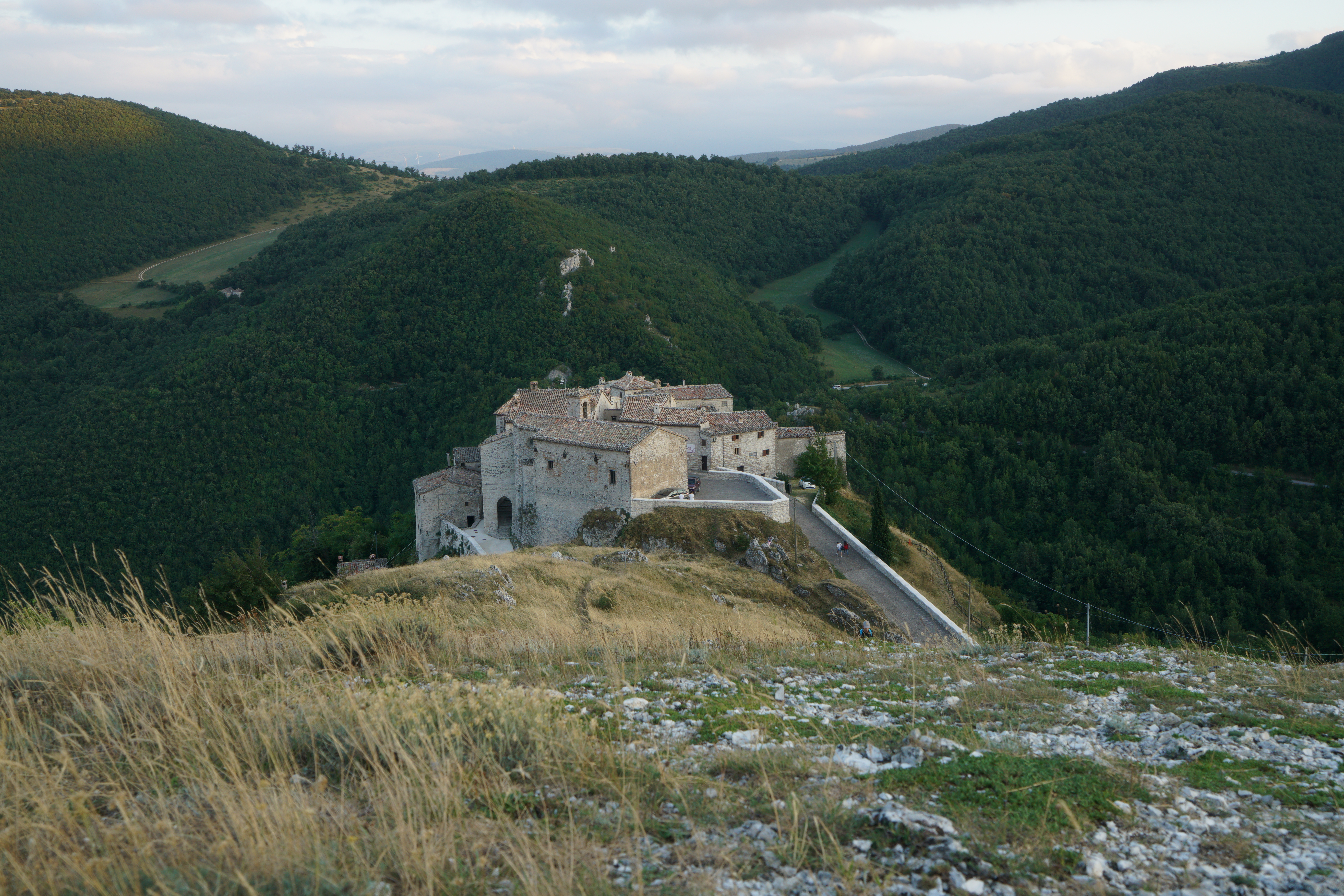 Panorama di Elcito (San Severino Marche)